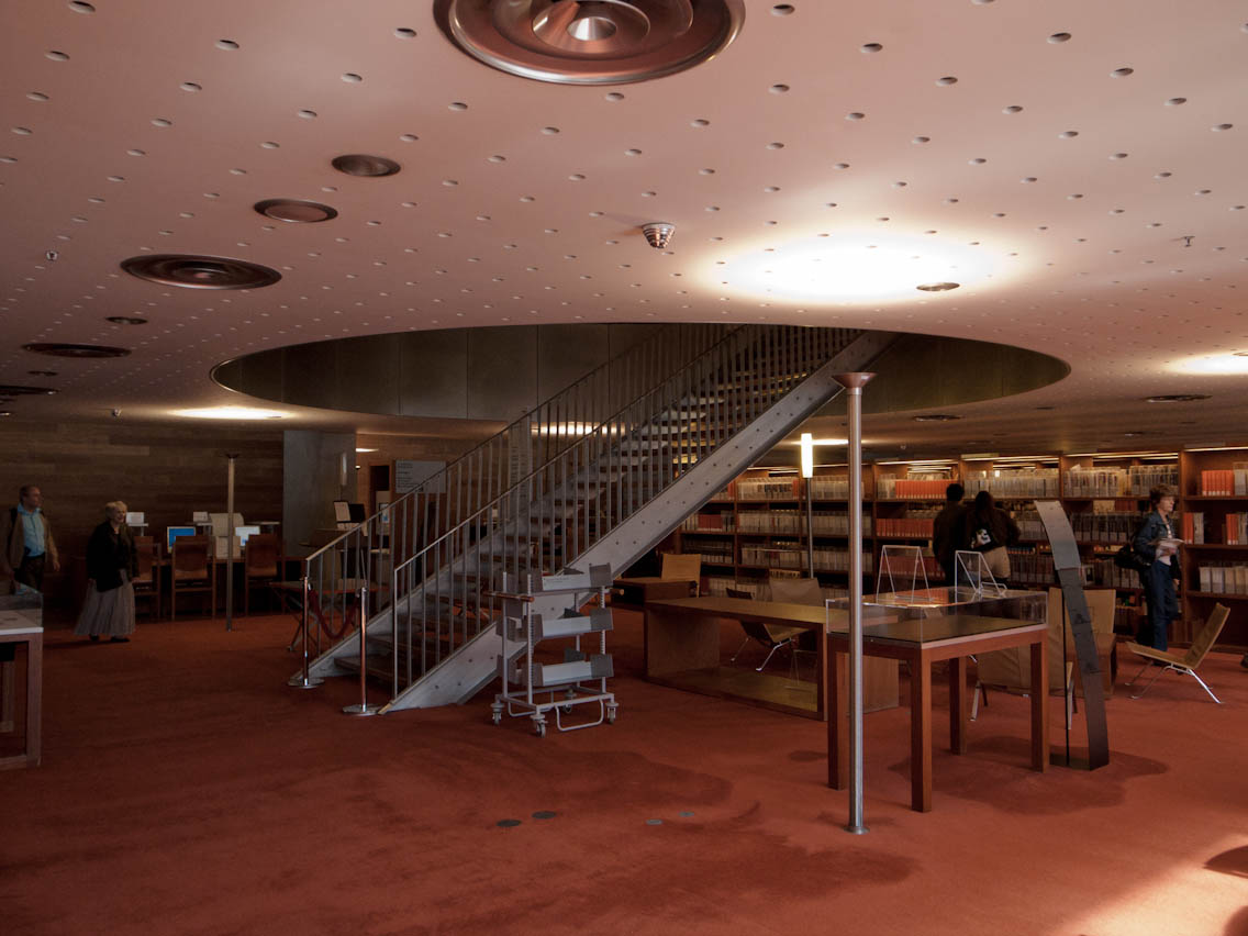 Bibliothèque nationale de France Site Tolbiac